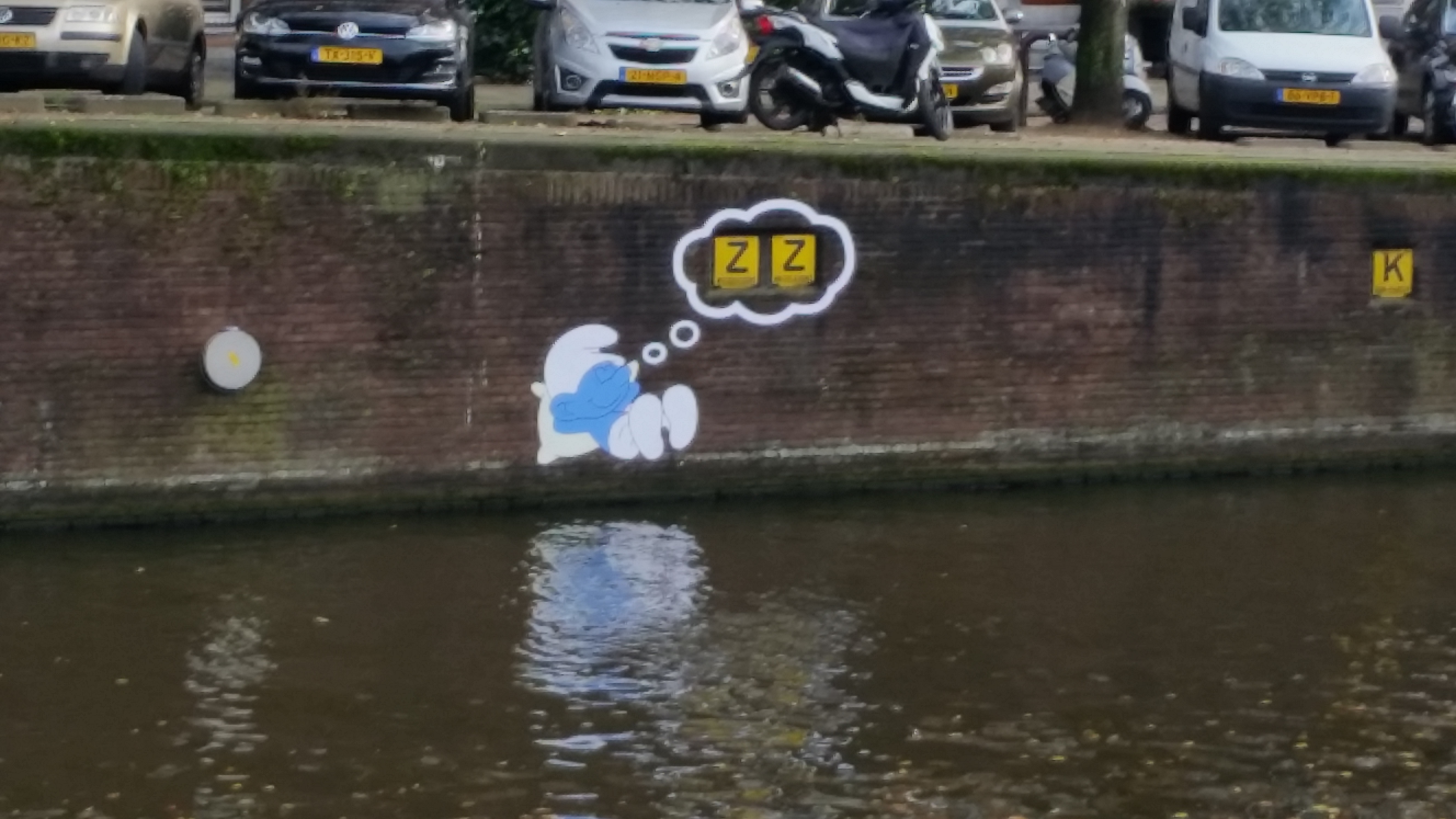 Slapende smurf, geplaatst door Streetart Frankey (2019) op de kademuur van de Korte Marnixkade, Amsterdam-Centrum.